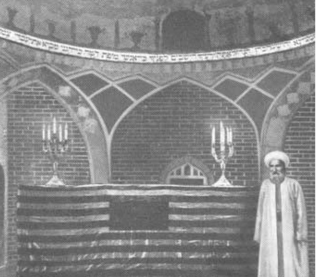 הרב עזרא דנגור בקבר יהושע כהן גדול